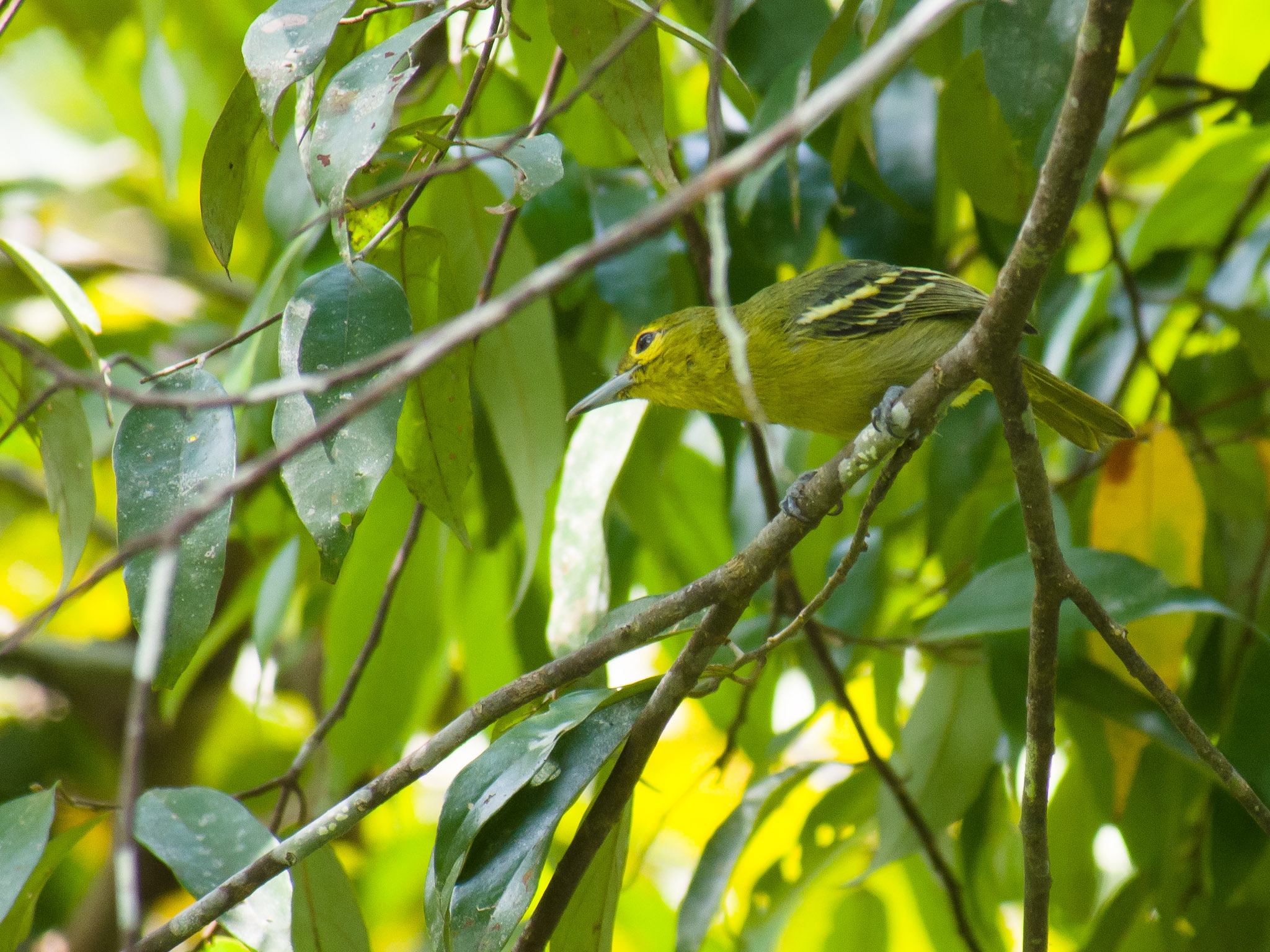 Green Iora